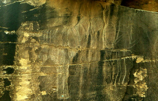 Gravures préhistoriques de la région d'El Bayadh, Algérie